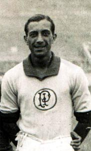 Nascimento, goleiro ídolo do Palestra Itália, atual Palmeiras, entre os anos de 1929 e 1934